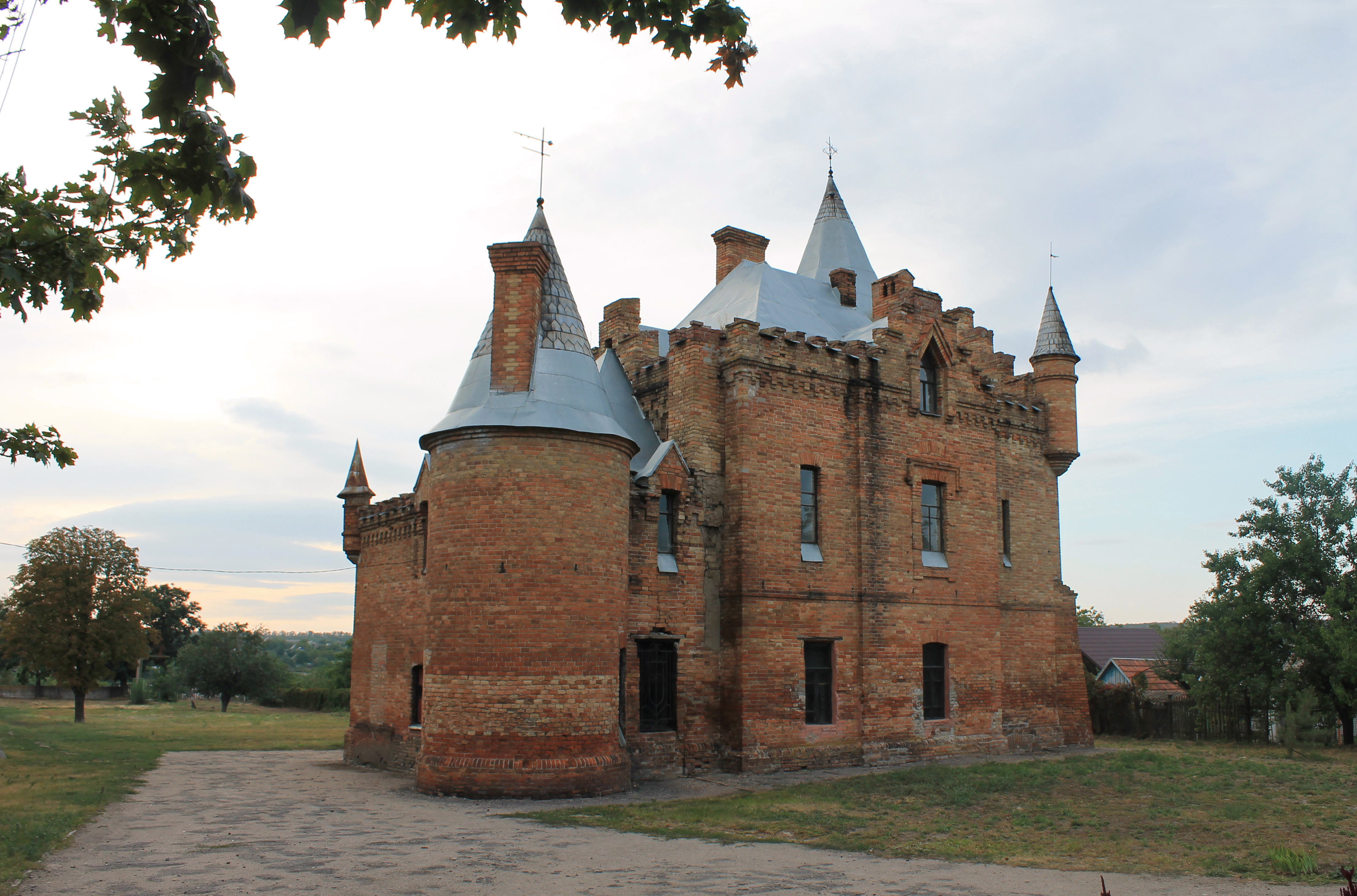 Палацевий комплекс "Садиба Попова": Західний флігель 1894р., вул.Гагаріна,12, м.Василівка, Запорізька обл.